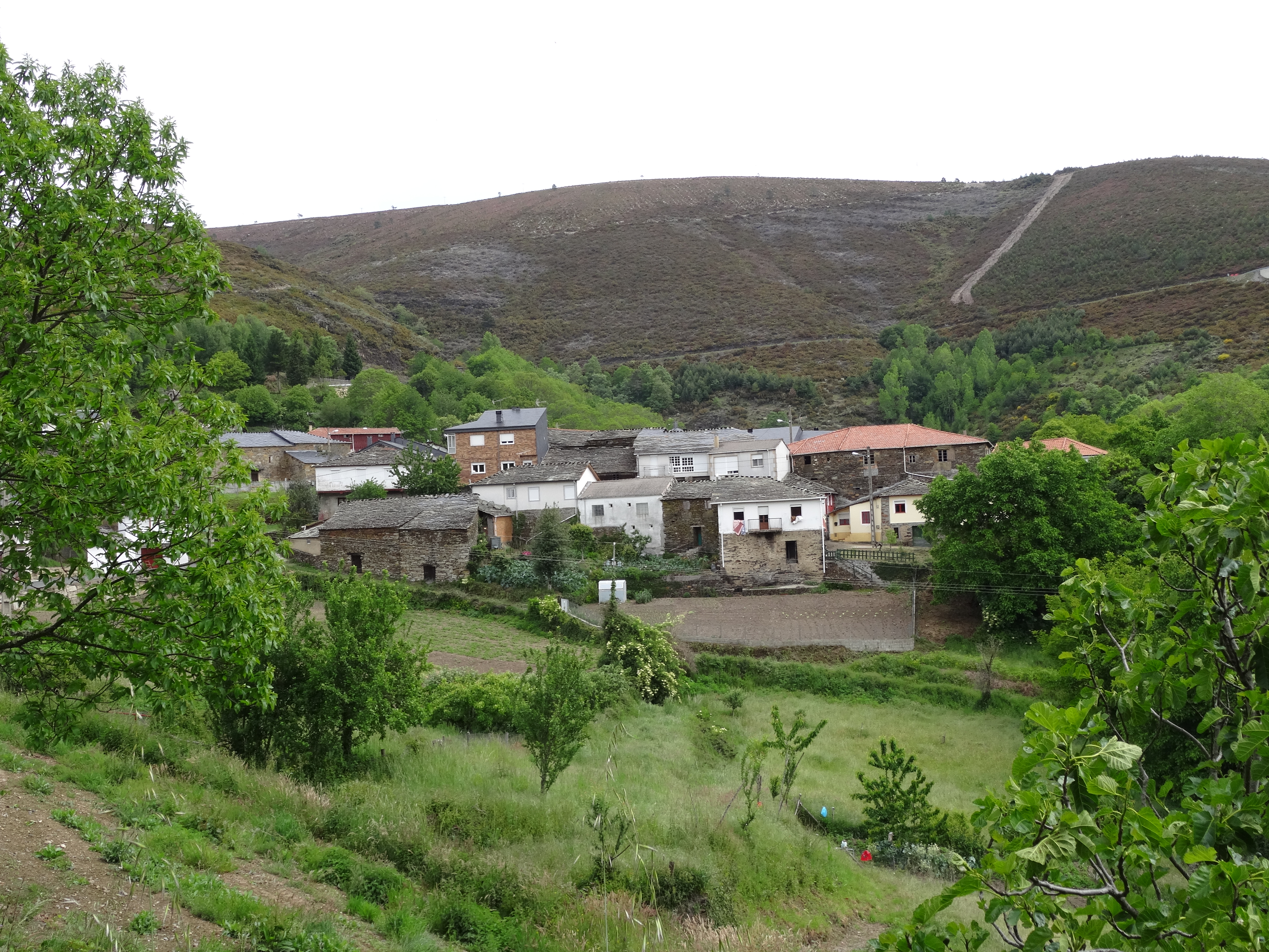 Ver título.